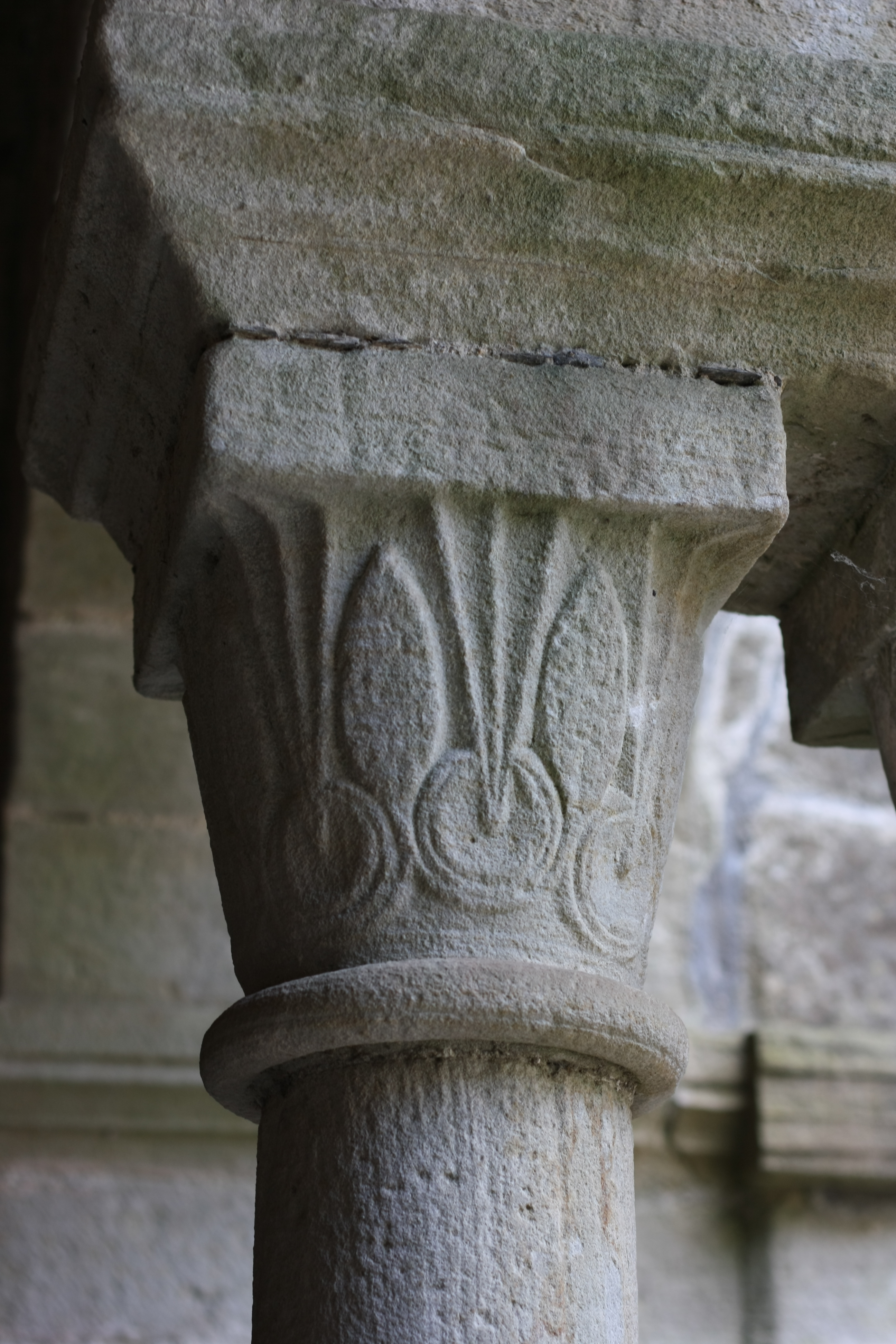 Kreuzgang des Priorats Saint-Michel de Grandmont, Kapitell